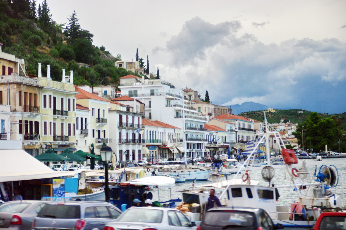 Gythio Hafen